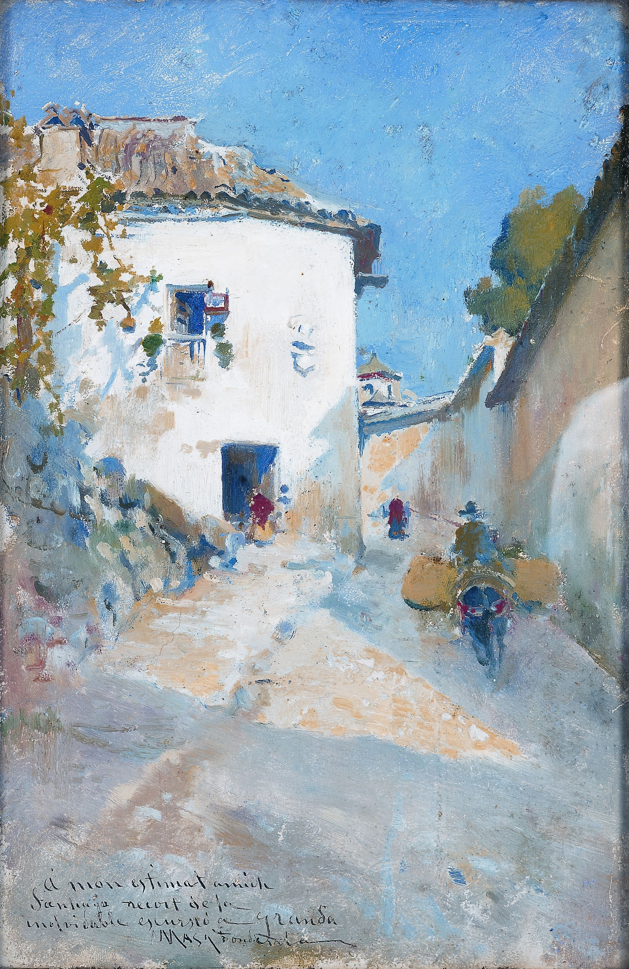 Paisatge de Granada, 1895. Museu Cau Ferrat de Sitges